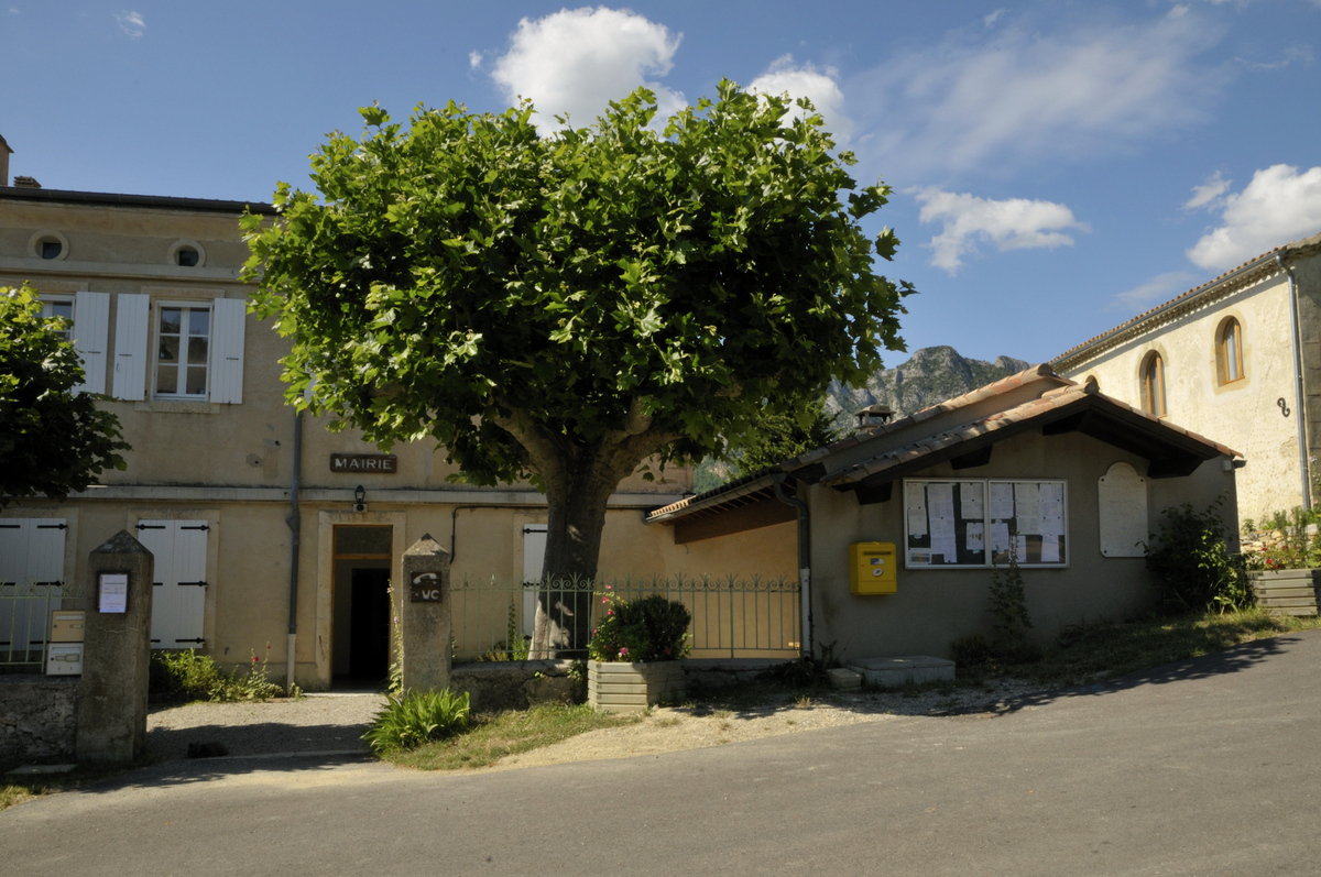 la mairie